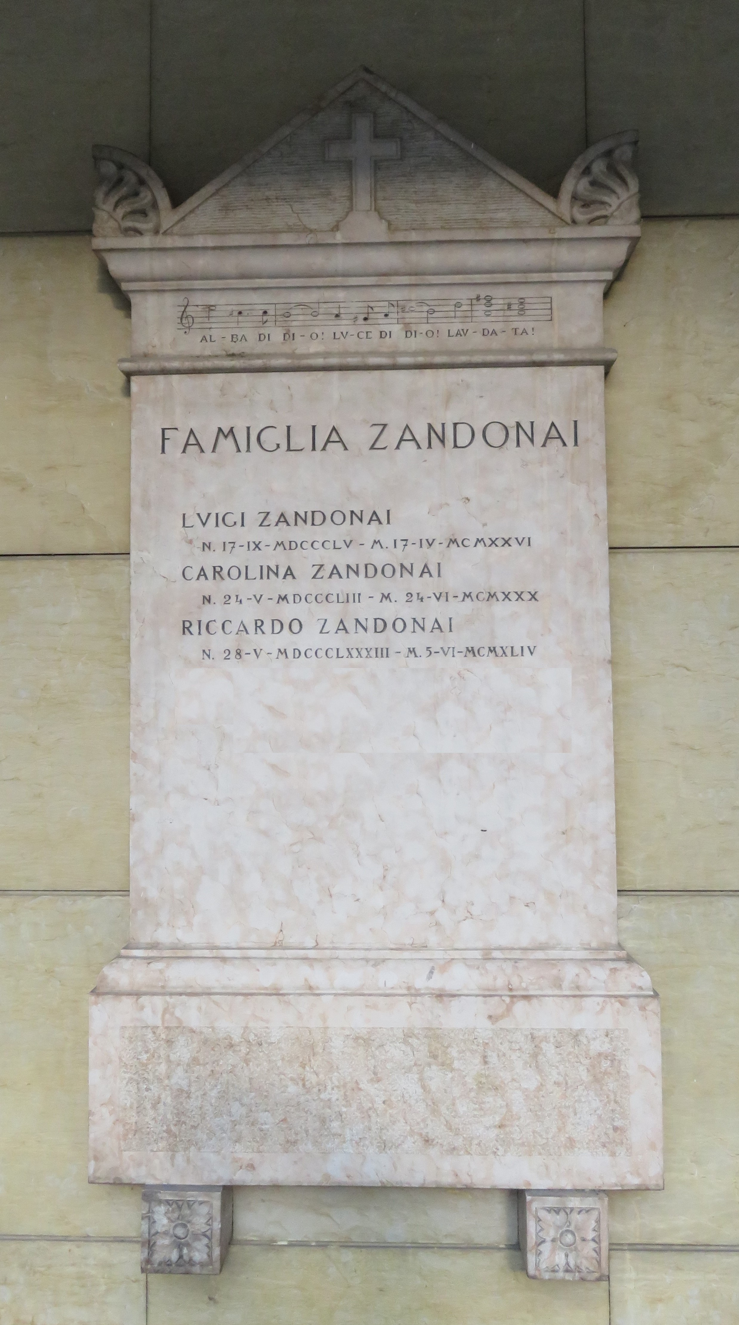 Tomba di Riccardo Zandonai - nel cimitero di Borgo Sacco, Rovereto